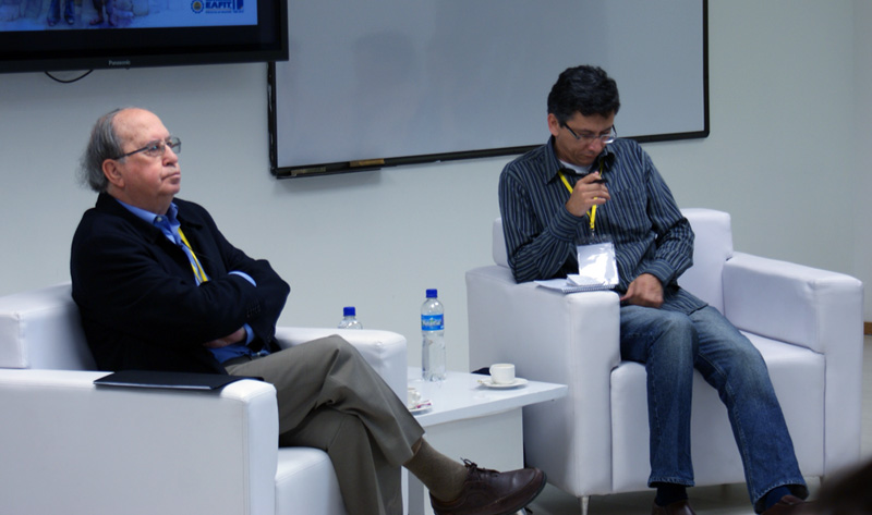 Jesús Martín-Barbero Profesor e investigador Jorge Bonilla Vélez Jefe del pregrado en Comunicación Social de la Universidad EAFIT